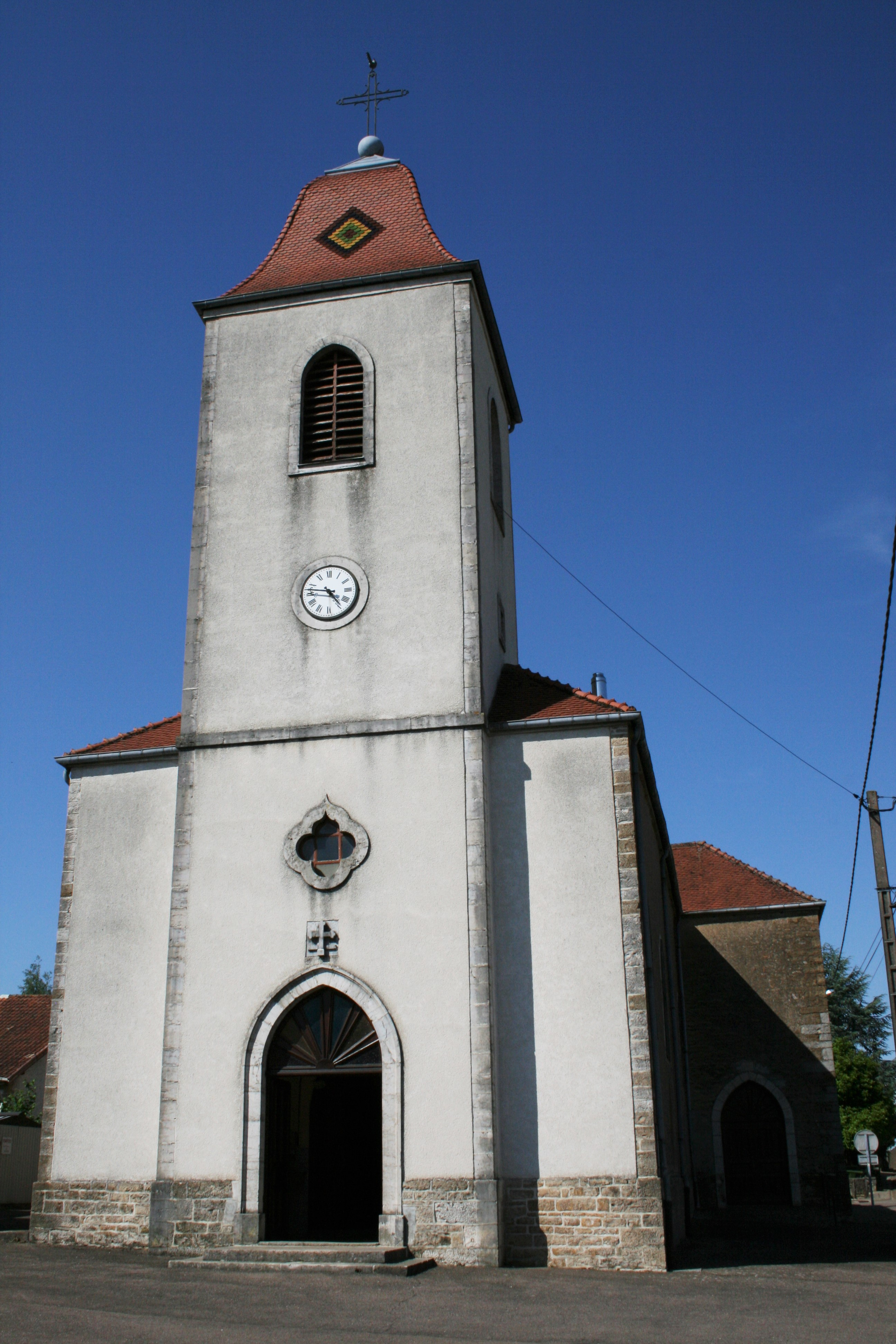 Autrey les Cerre ( Haute-Saône ) église de l'Imaculée Conception 1847